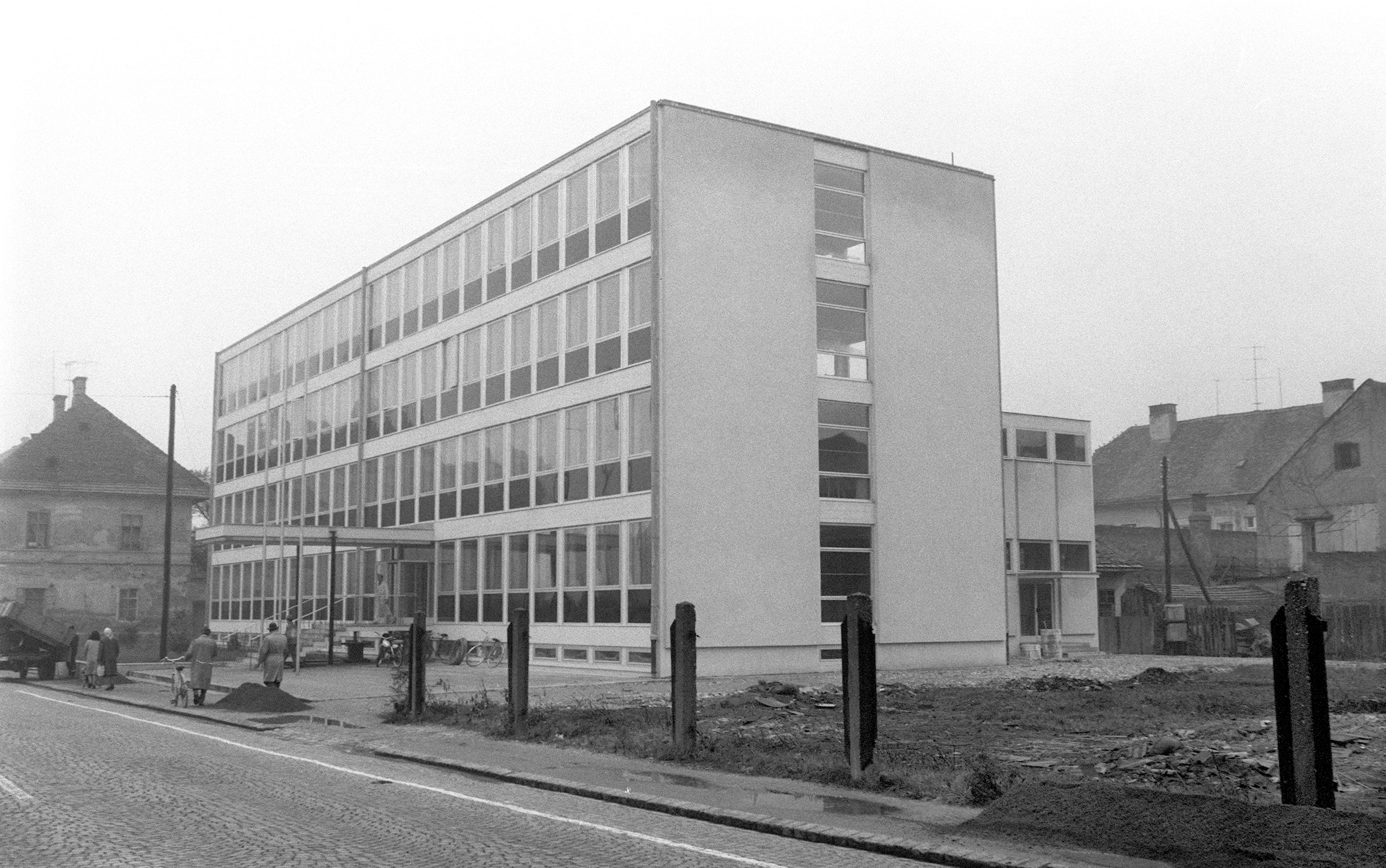 Večerova stavba v Mariboru.